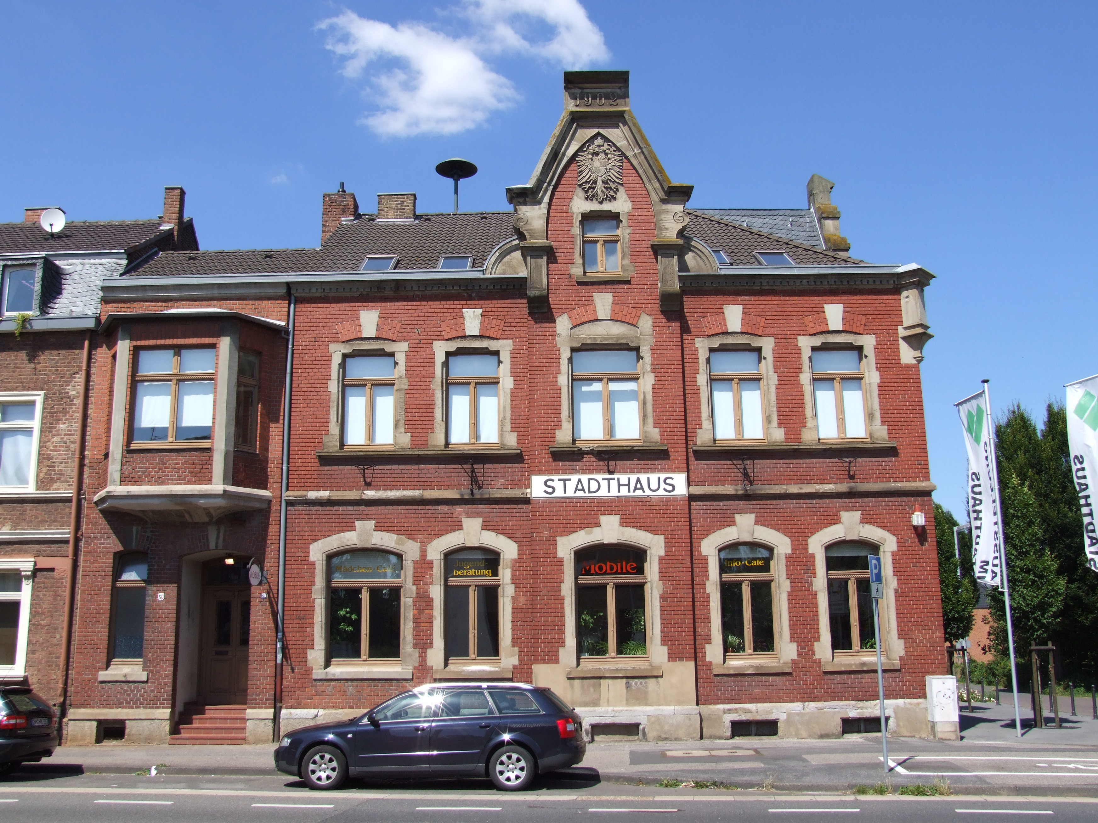 Altes Stadthaus in Lechenich